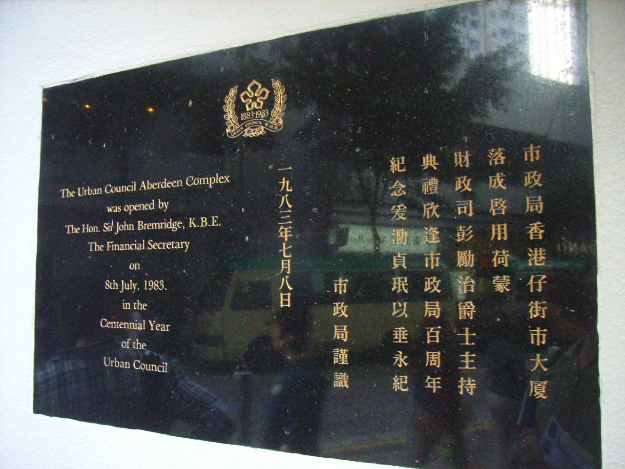 中文（香港）: 香港島南區香港仔市政大廈前市政局奠基石，1983年由彭勵治 (John Henry Bremridge) 主持開幕典禮。